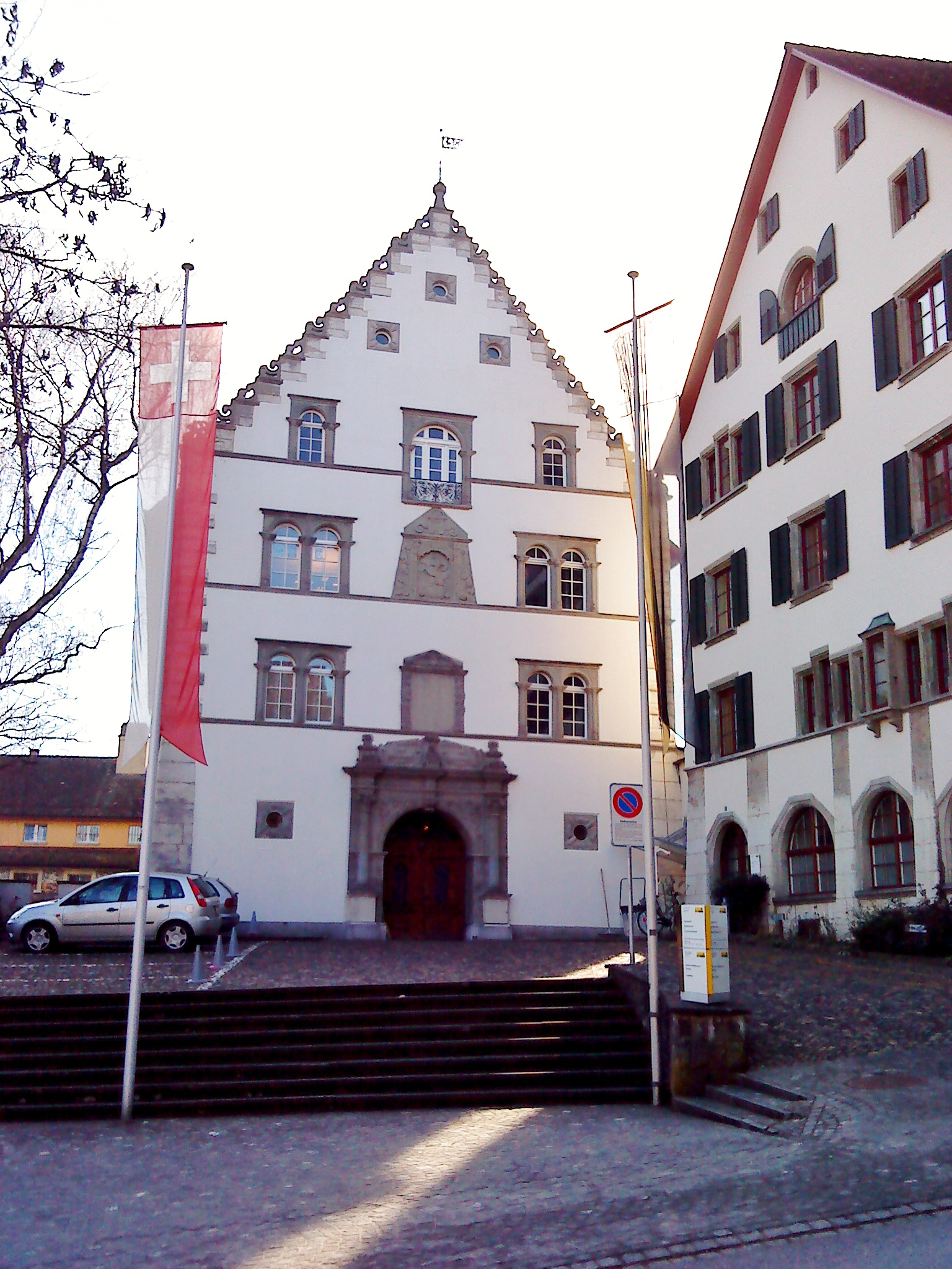 Regierungsgebäude des Kantons Schaffhausen, an der Beckenstube in Schaffhausen/Schweiz.